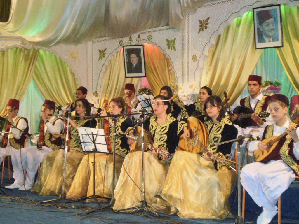 Toujours présente dans les grands événements, l'association El Widadia est montée sur scène au Parc ce 27 mai dans le cadre des Journées du haouzi.